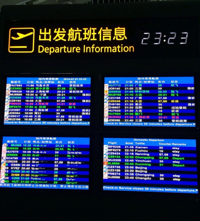 郑州新郑国际机场